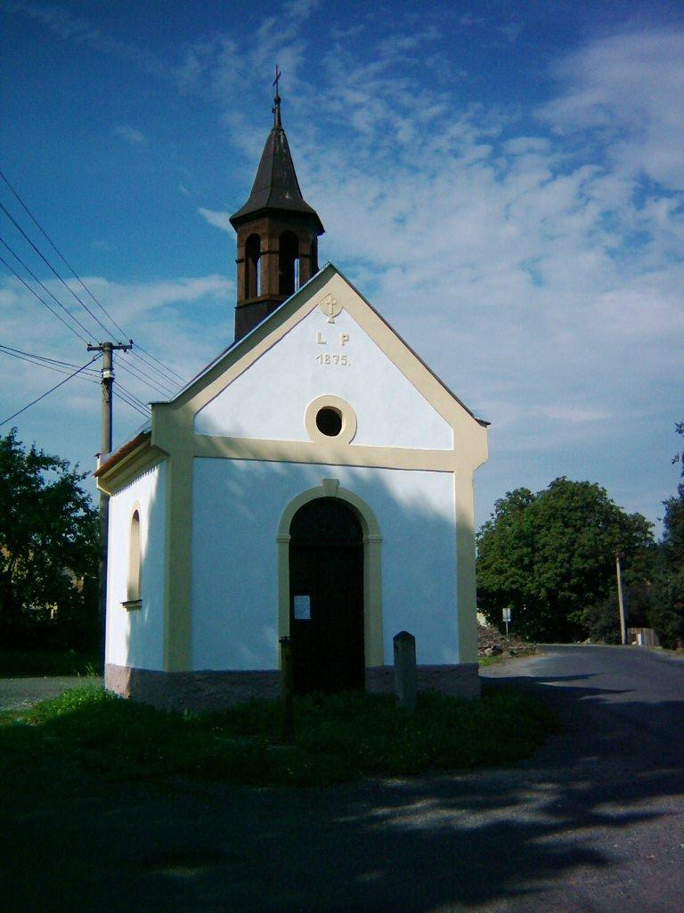 kaplička